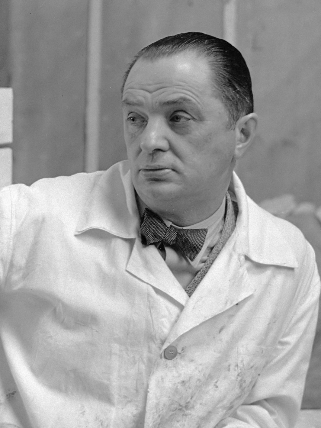 Warschau. Portret van de beeldhouwer Edward Wittig (1879-1941) 1934